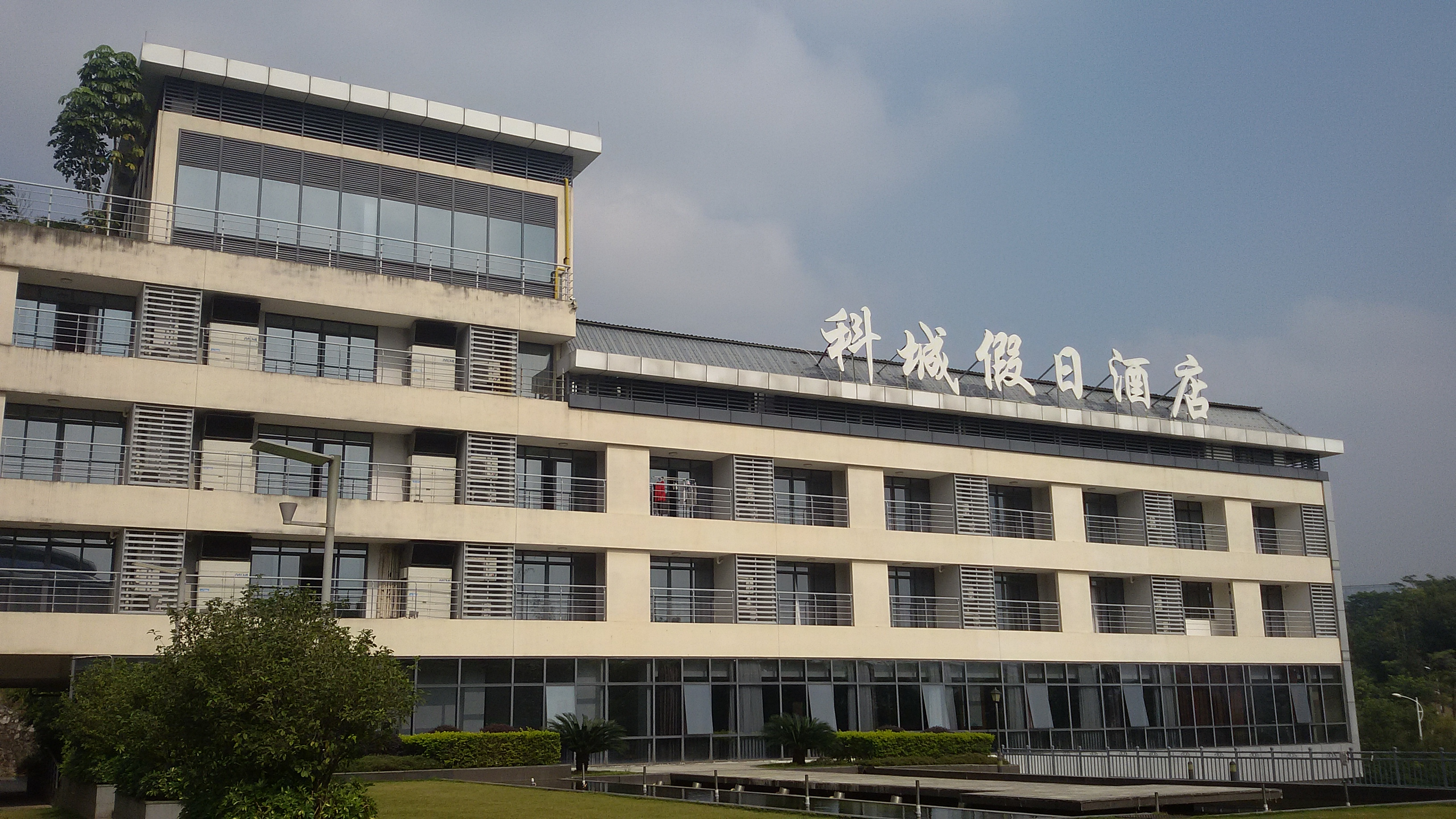 粵語: 科城假日酒店